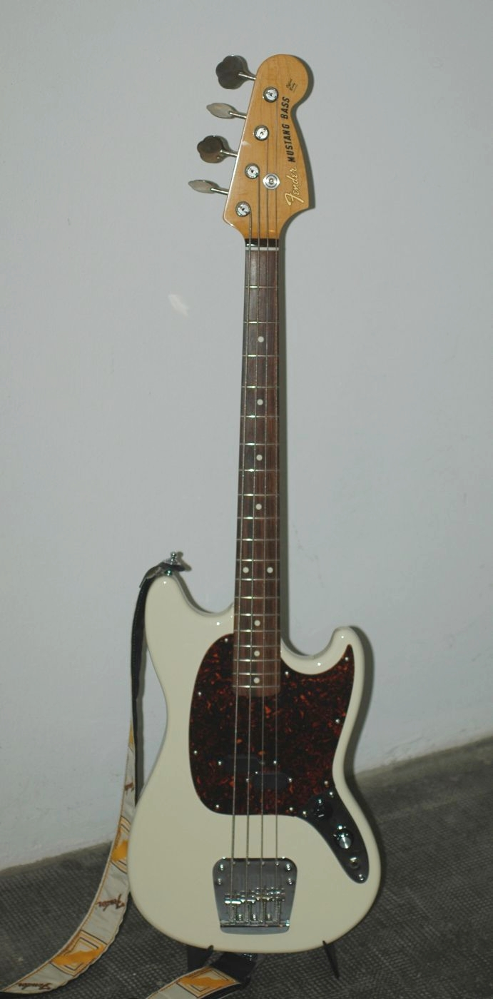 Bildbeschreibung: E-Bass Fender "Mustang", shortscale 30" Quelle: selbst fotografiert Fotograf: Joachim Hensel-Losch Datum: Jan. 11, 2006 andere Versionen